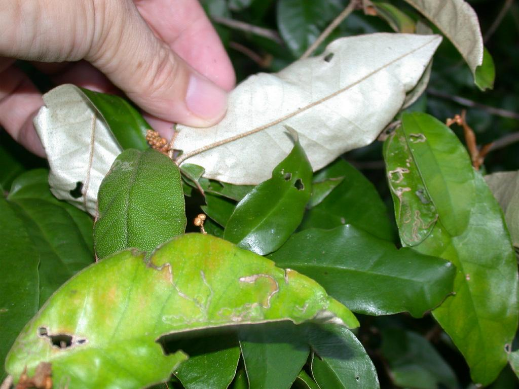 Croton cascarilloides：グミモドキ 2004/08/10 沖縄本島中部: Okinawa Island, Japan